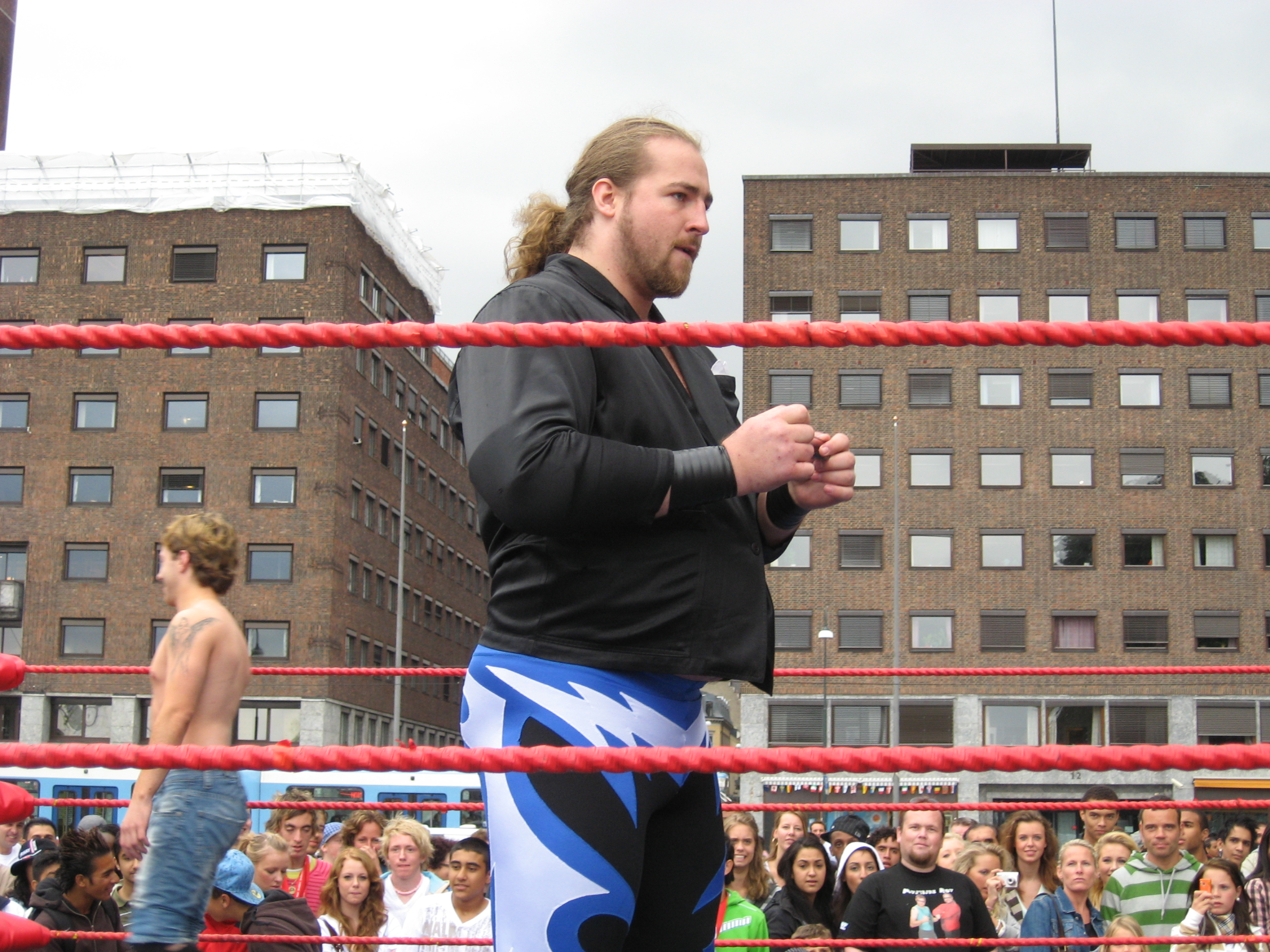 Fribryteren Bjørn Sem gjør seg klar for kampen mot Dandy Gomann, på Summer Splash på Aker brygge.Bjørn Sem